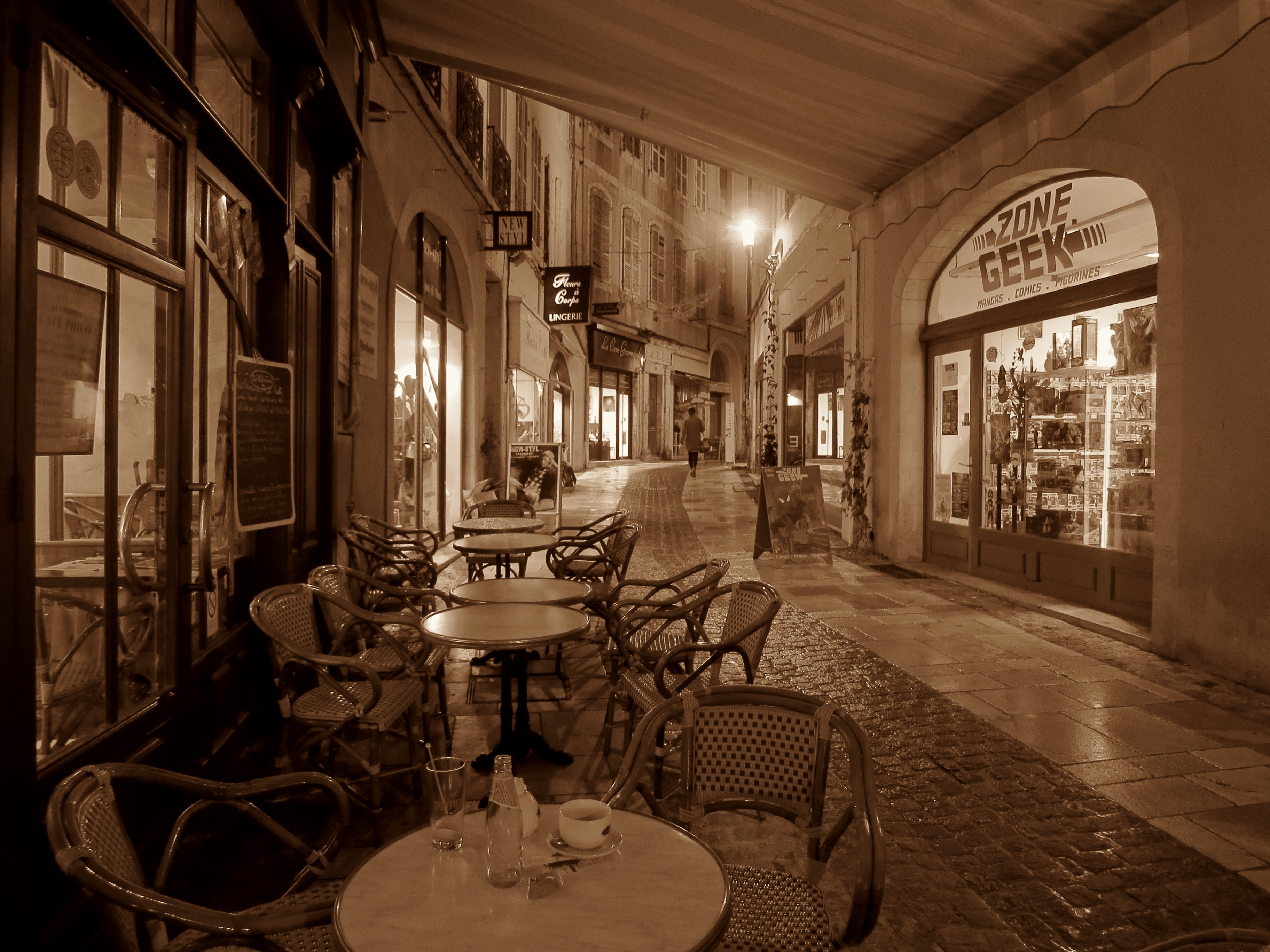 Auch (Gers, France) - Rue Dessoles.